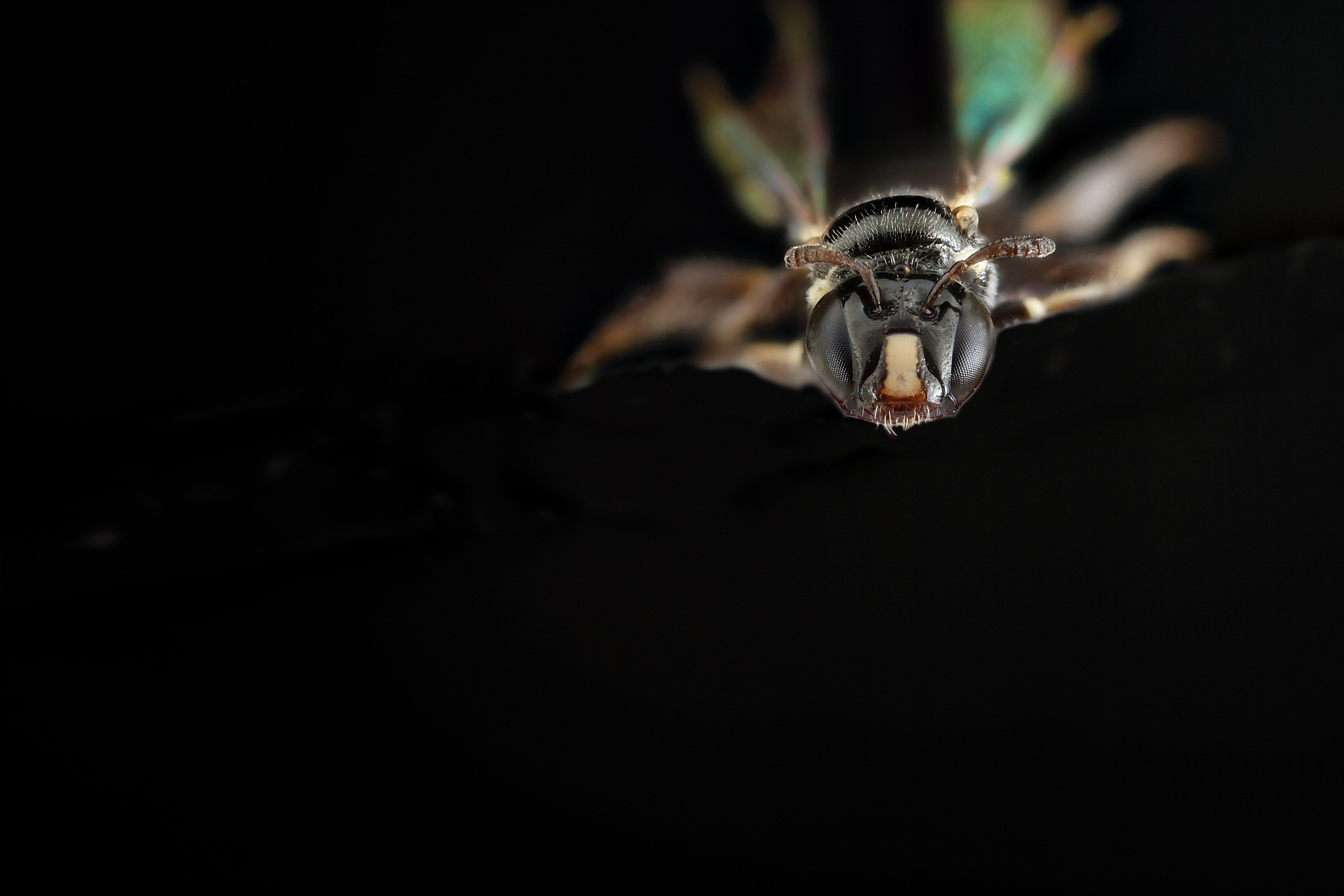 Ceratina cockerelli, female